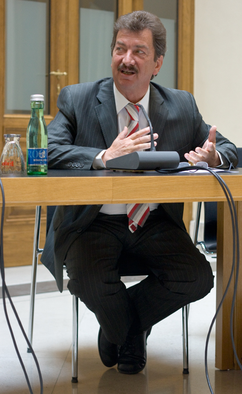 Ing. Kurt Gartlehner, SPÖ fotografiert von karolariegler.at